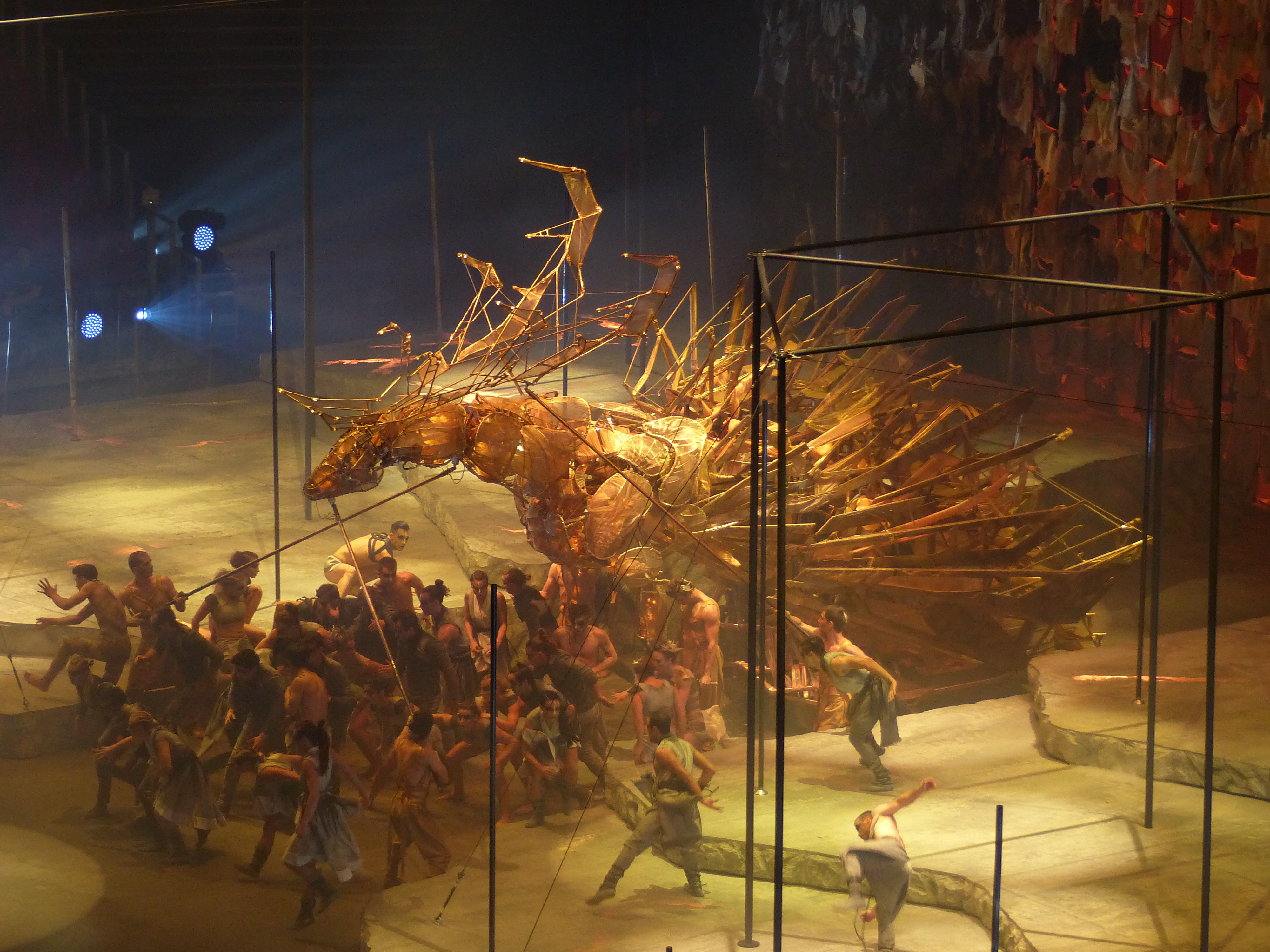 A 2017-es úszó-világbajnokság záróünnepségén került előadásra a Csodaszarvas című produkció. A felvétel 2017. július 29-én készült a záróünnepség főpróbáján. A Produkcióban mintegy 200 művész lépett fel. A víz került az előadás középpontjába, megelevenedett a kiszáradt föld felett a vizet váró fecskék tánca, amit a Madách Színház növendékei elevenítettek meg. Az „Istenek erdeje” címet kapta a harmadik felvonás, amiben a hazát kereső őseink története elevenedett meg. Ebben a jelenetben 14 artista segédkezett, fellépésük közben megjelent a föld és a tűz szimbóluma is. Kasza Emese díszlettervező jóvoltából a magyar és a koreai kultúra is keveredett a színpadon, ahol a Csodaszarvast egy hat méter magas és hét méter hosszú báb formálta meg. Az „Az élet forrása” elnevezésű felvonásban akrobatákat, rúdtáncosokat, valamint kortárs táncosokat láthattak az ünnepségen részt vevők, valamint megjelenítették a tóban levő vízcseppeket és az élet vizét is a fellépők. Vági Bence és Illés Renátó ötletére és koreográfiájára egyszerre húsz légtornász emelkedett a magasba, majd záró részként a Csodaszarvas legendájának lezárásával egy időben már a következő rendező országot, Dél-Koreát köszöntötte a produkció, amely a „Korea kapuja” nevet kapta.